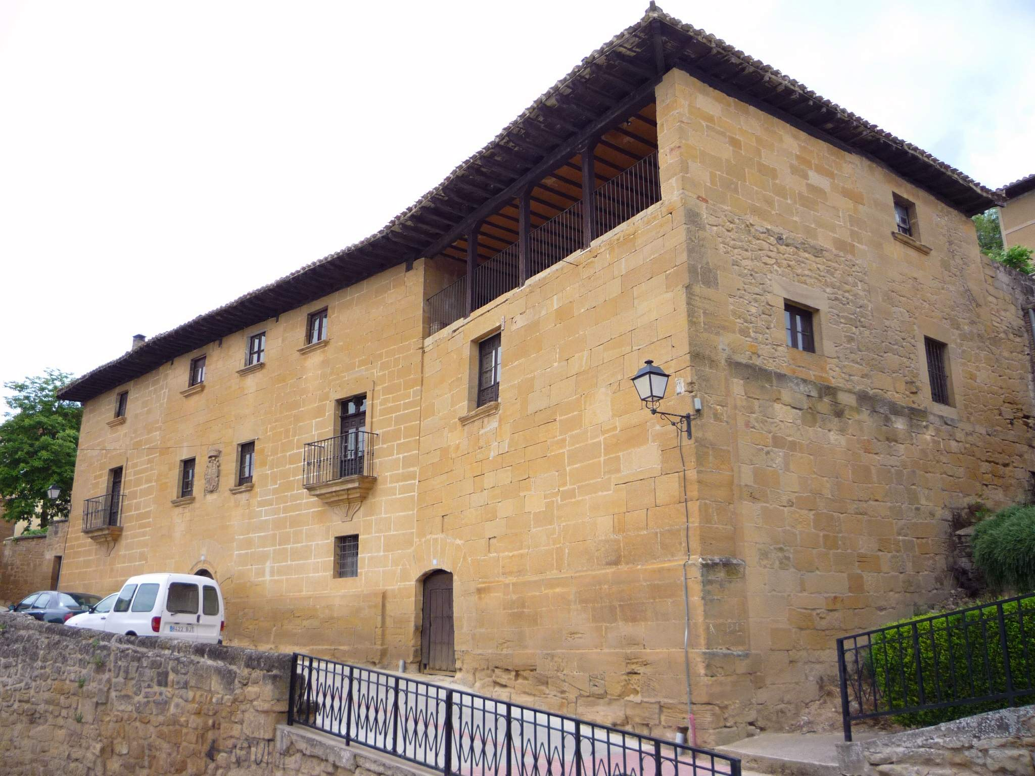 Casa del Marqués de la Plaza (Villabuena, Álava)